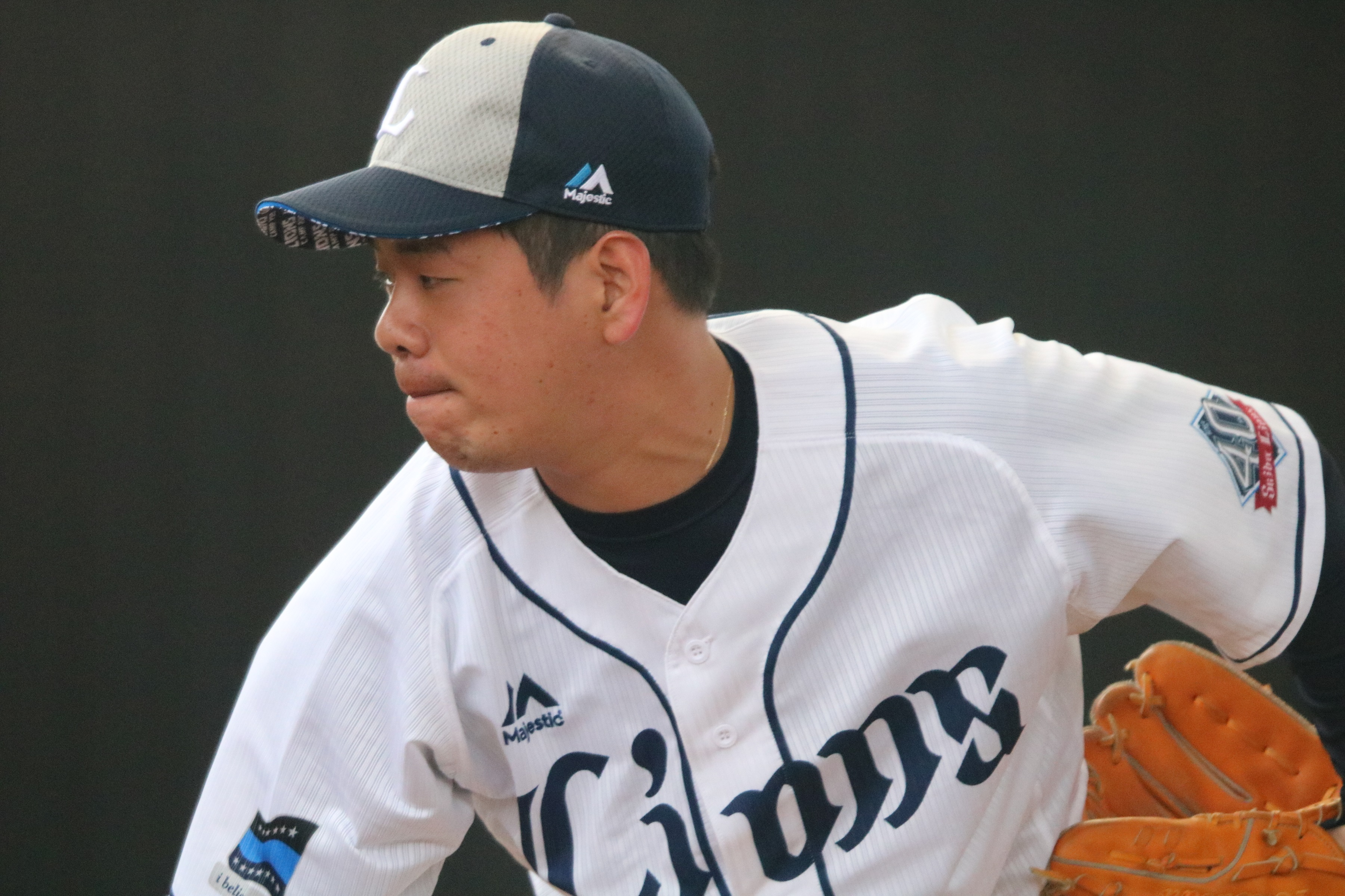 2018年2月9日